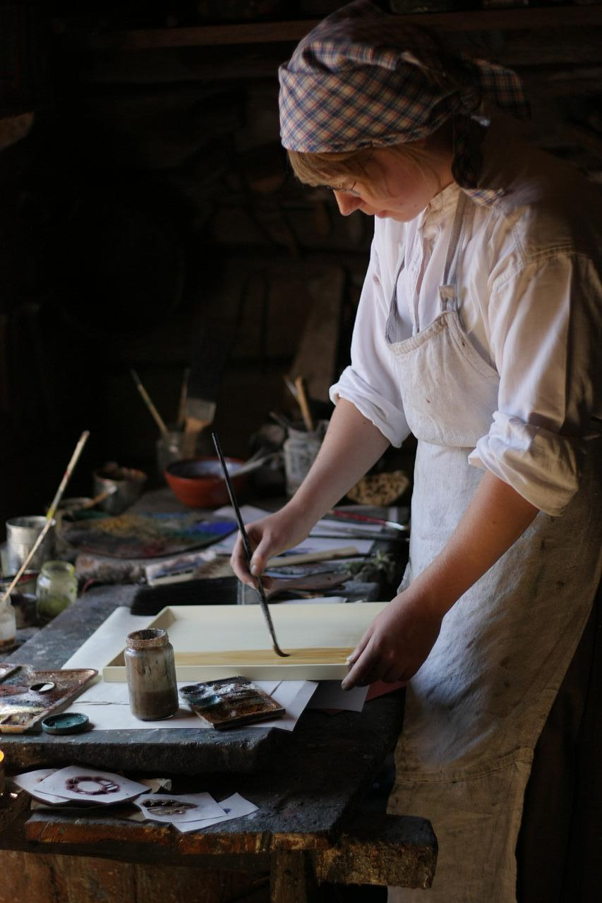 Turku Handcraft Museum, painter